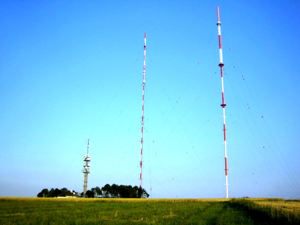 Sendeanlage des Bayerischen Rundfunks auf dem Dillberg